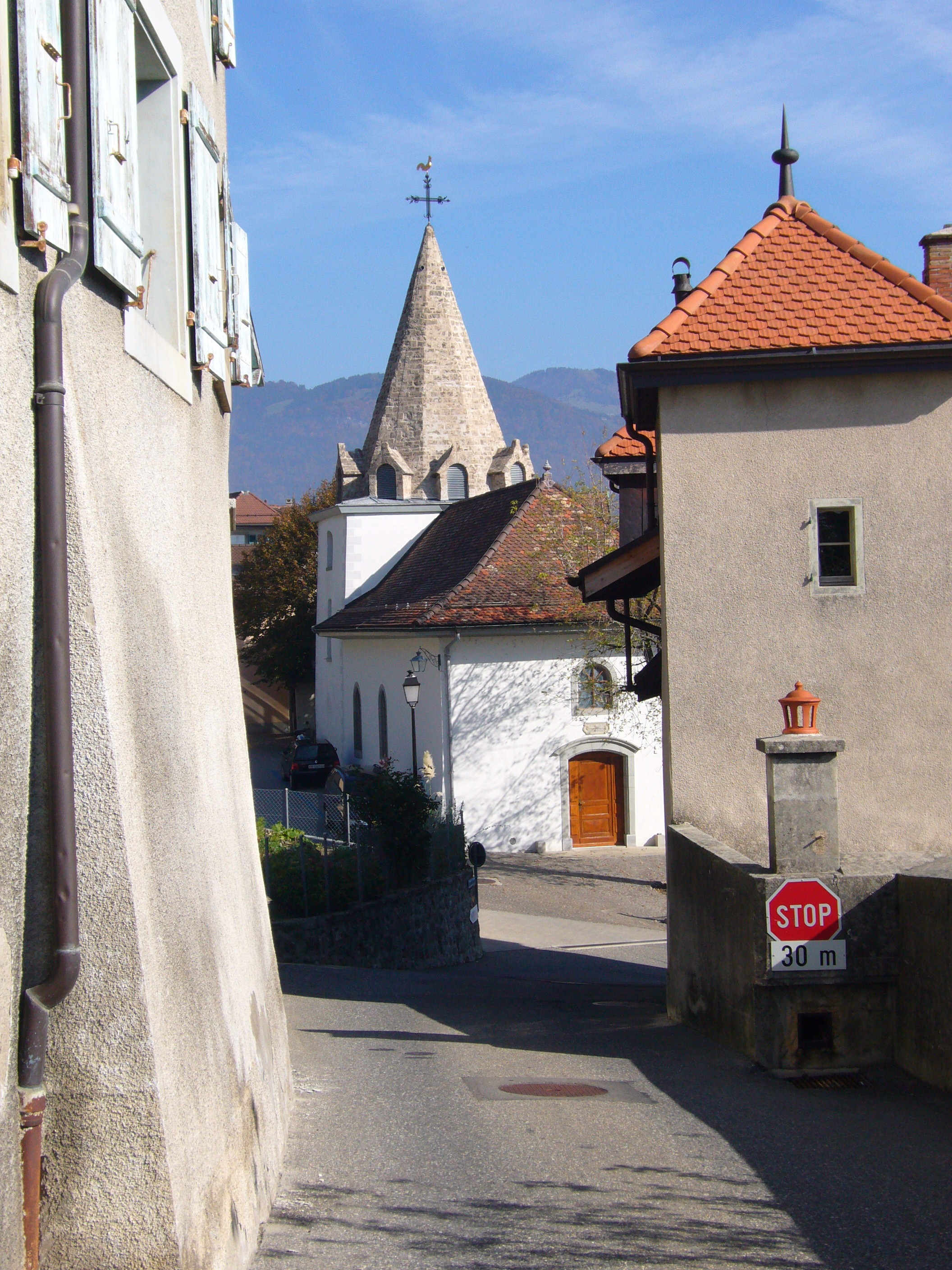 Kirche in Chardonne, Kanton Waadt